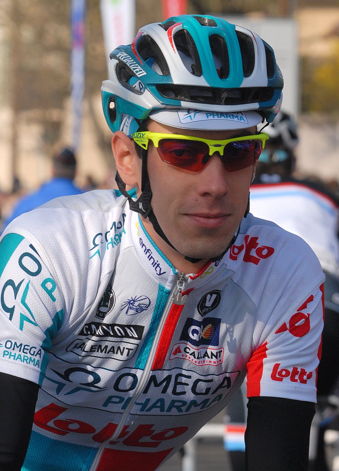 Bart De Clercq (Zottegem, 26 augustus 1986) is een Belgisch wielrenner die anno 2011 uitkomt voor Omega Pharma-Lotto.